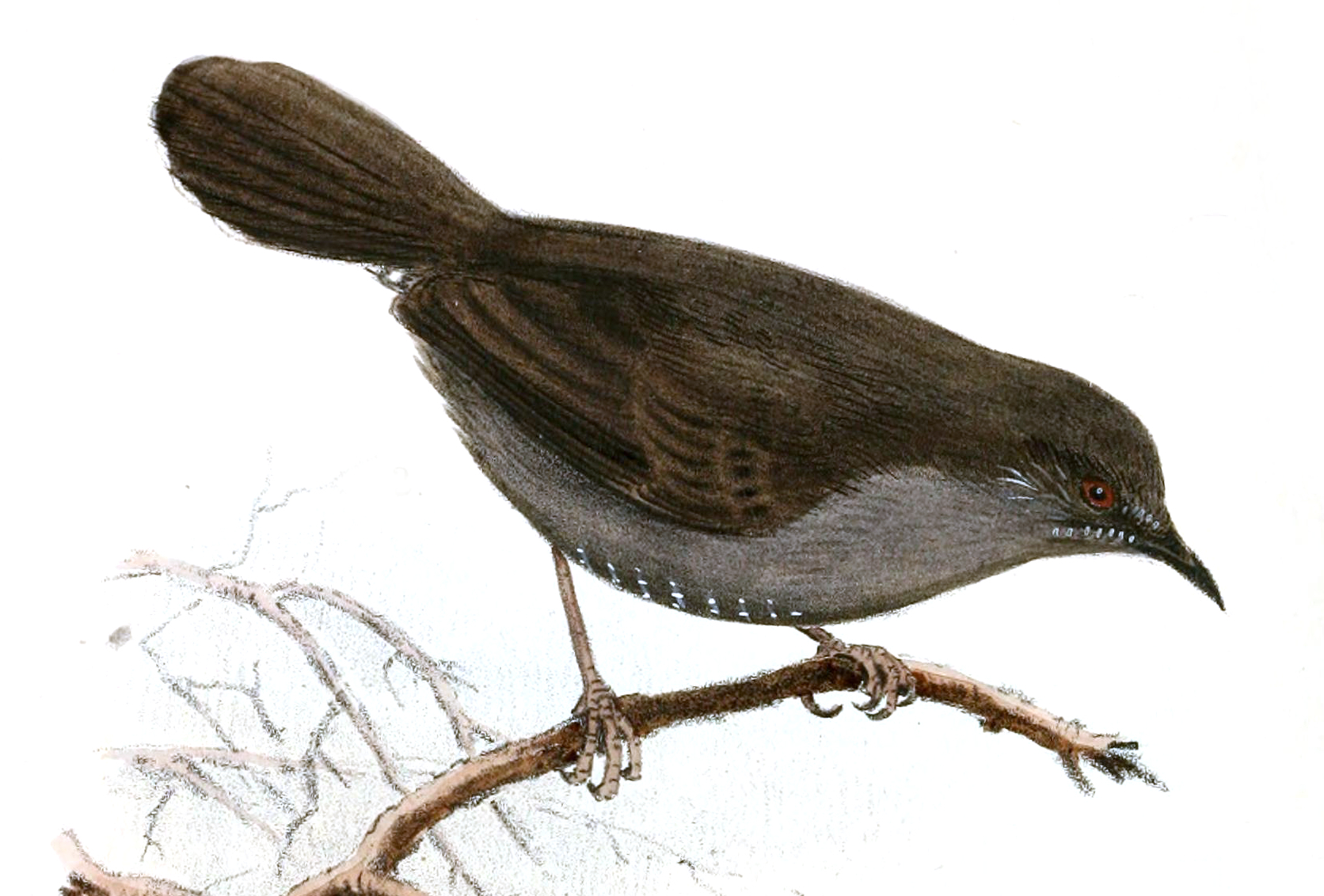 Camaroptera simplex